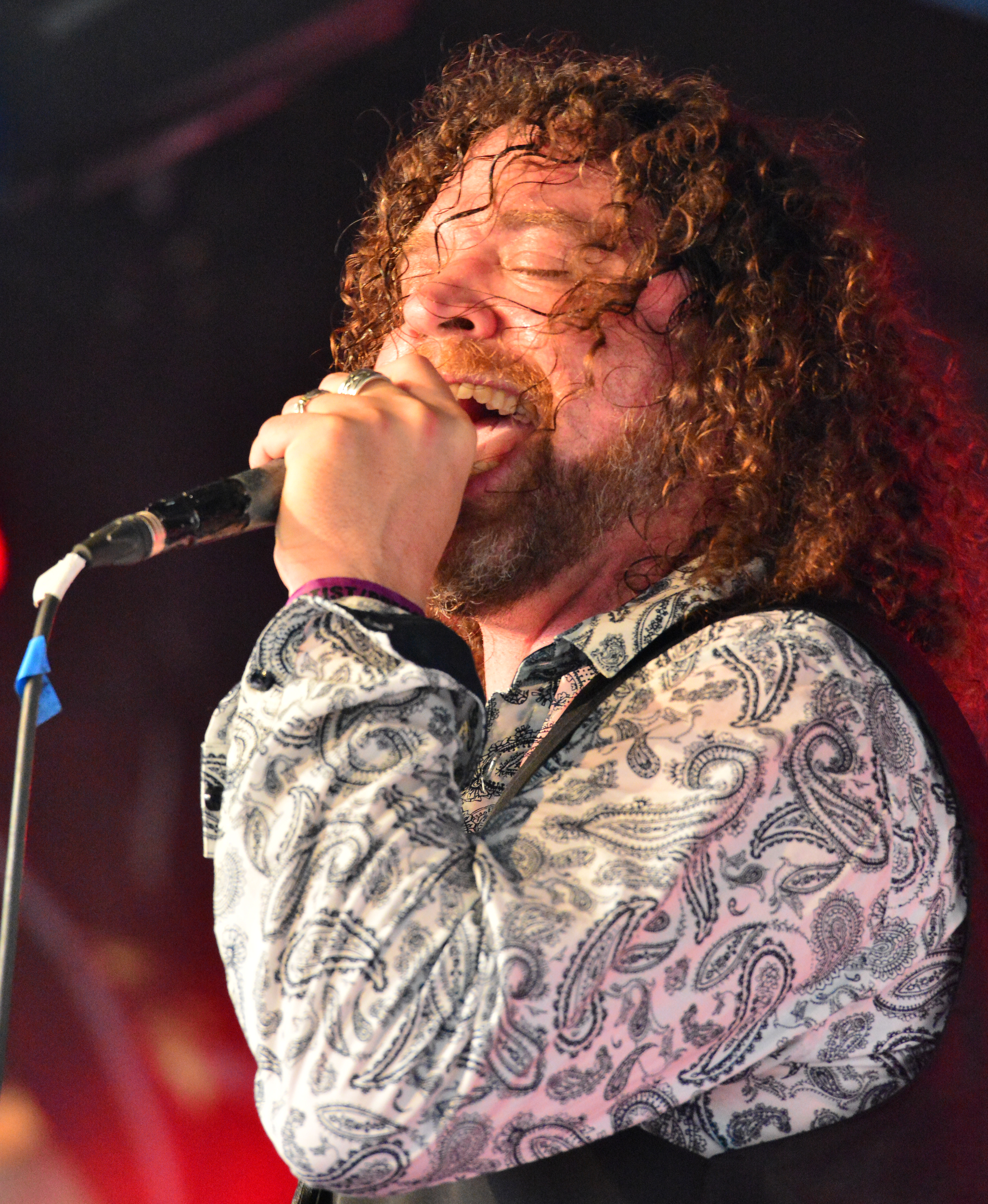 Jacopo Meille von Tygers of Pan Tang beim Headbangers Open Air 2014